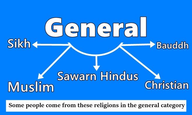 भारत की वर्ग व्यवस्था में सामान्य वर्ग में किन धर्मों के लोग आते हैं उनके बारे में एक ज्ञानपुर चित्र बनाया गया है.